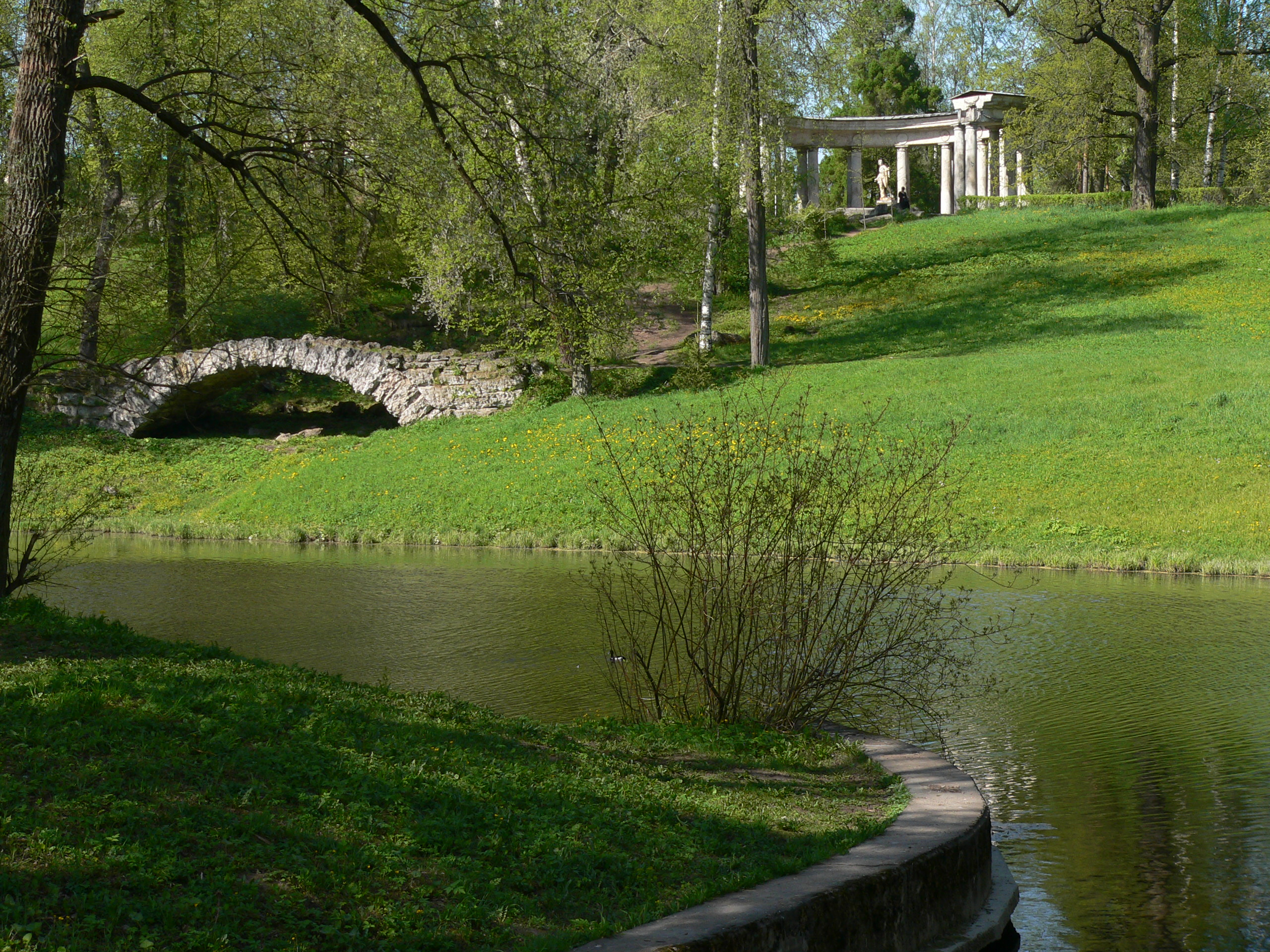 Вид с Кентаврового моста на долину реки Славянка и Колоннаду Аполлона в Павловском парке.